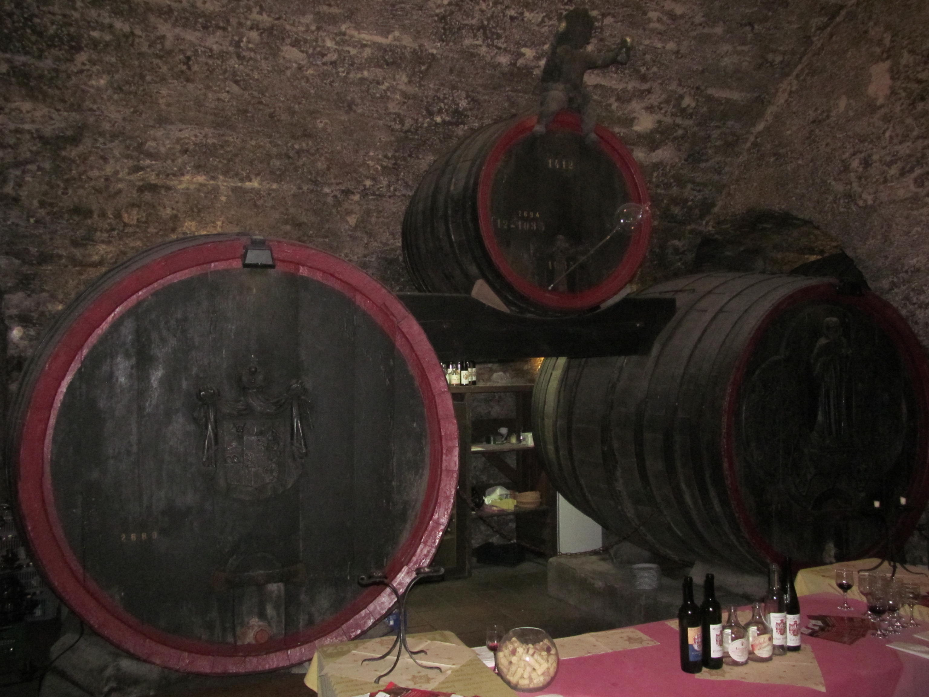 Sudy na víno ve sklepě mělnického zámku